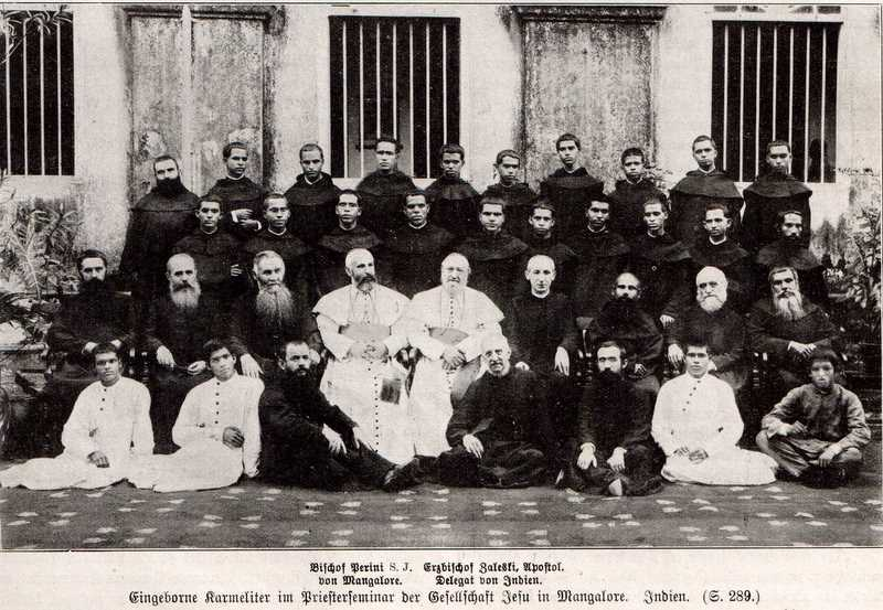 Ladislaus Zaleski, Apostolischer Delegat von Indien, lateinischer Patriarch von Antiochien, im Seminar von Mangalore, Indien